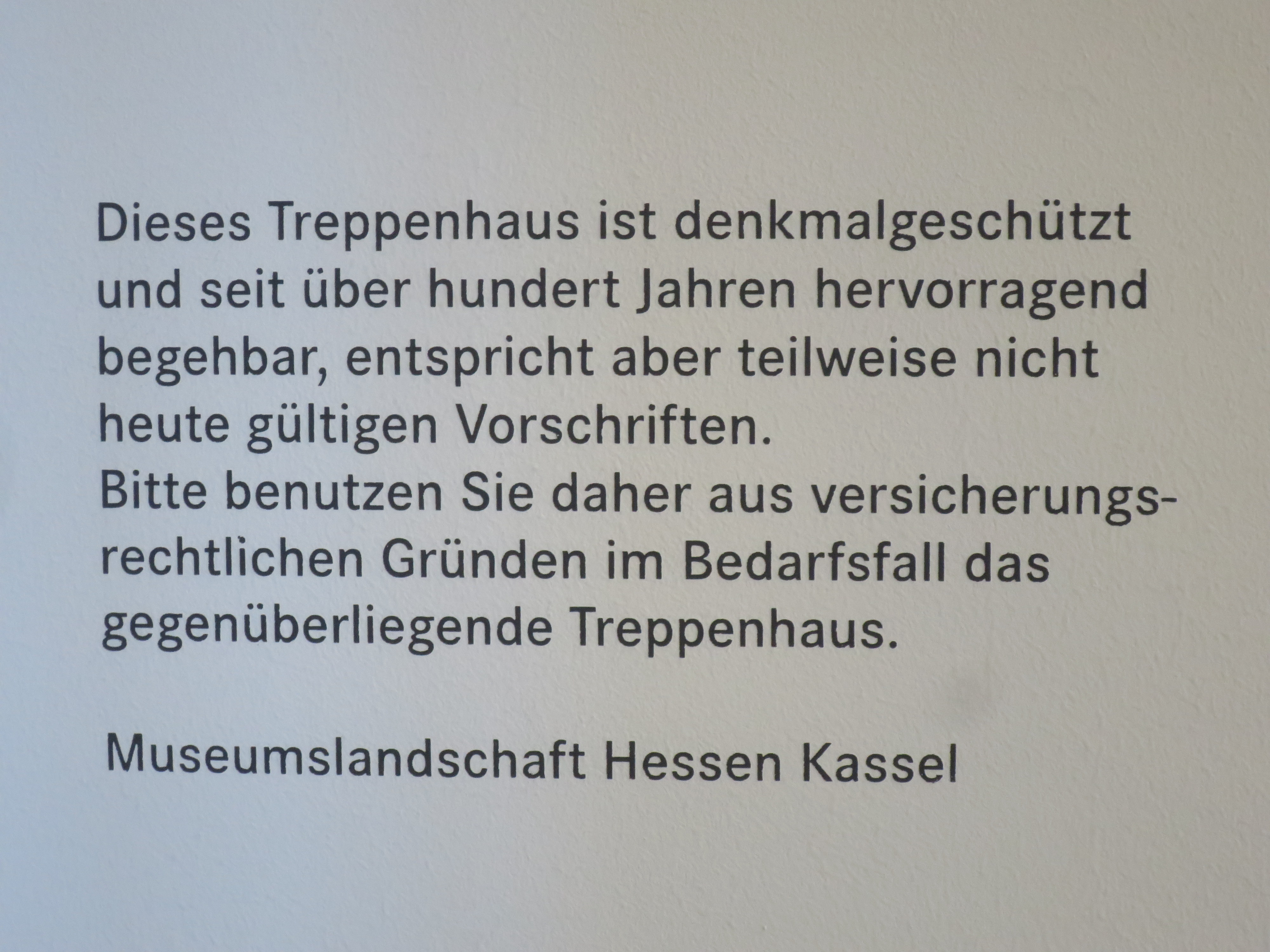 Denkmal-Warnhinweis